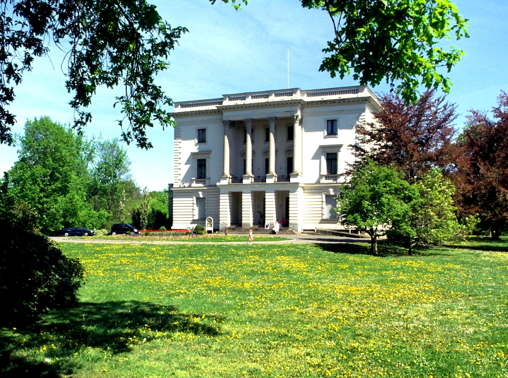 "Weißes Haus" in Markkleeberg